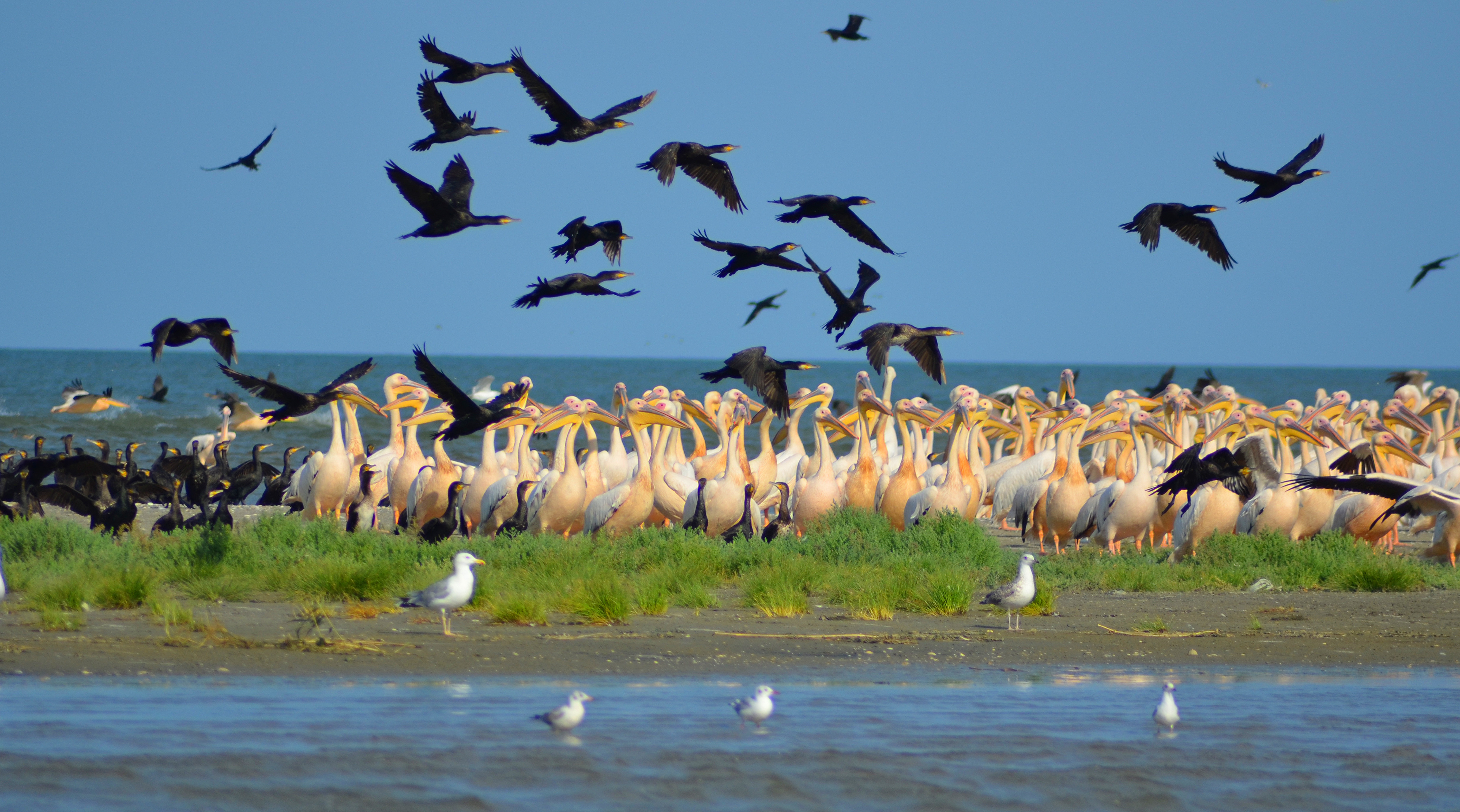 Дунайський біосферний заповідник, Кілійський р-н, м. Вилкове, вул. Татарбунарського повстання, 132 а